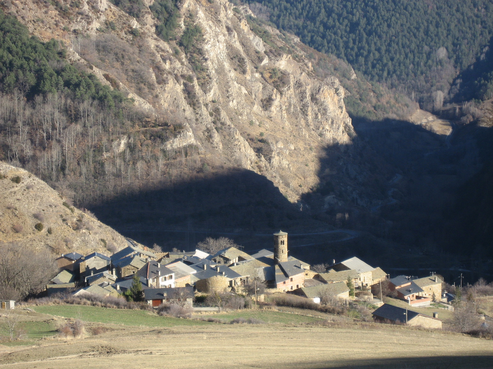 Poble d'Ars (Valls de Valira, Alt Urgell, Catalunya).